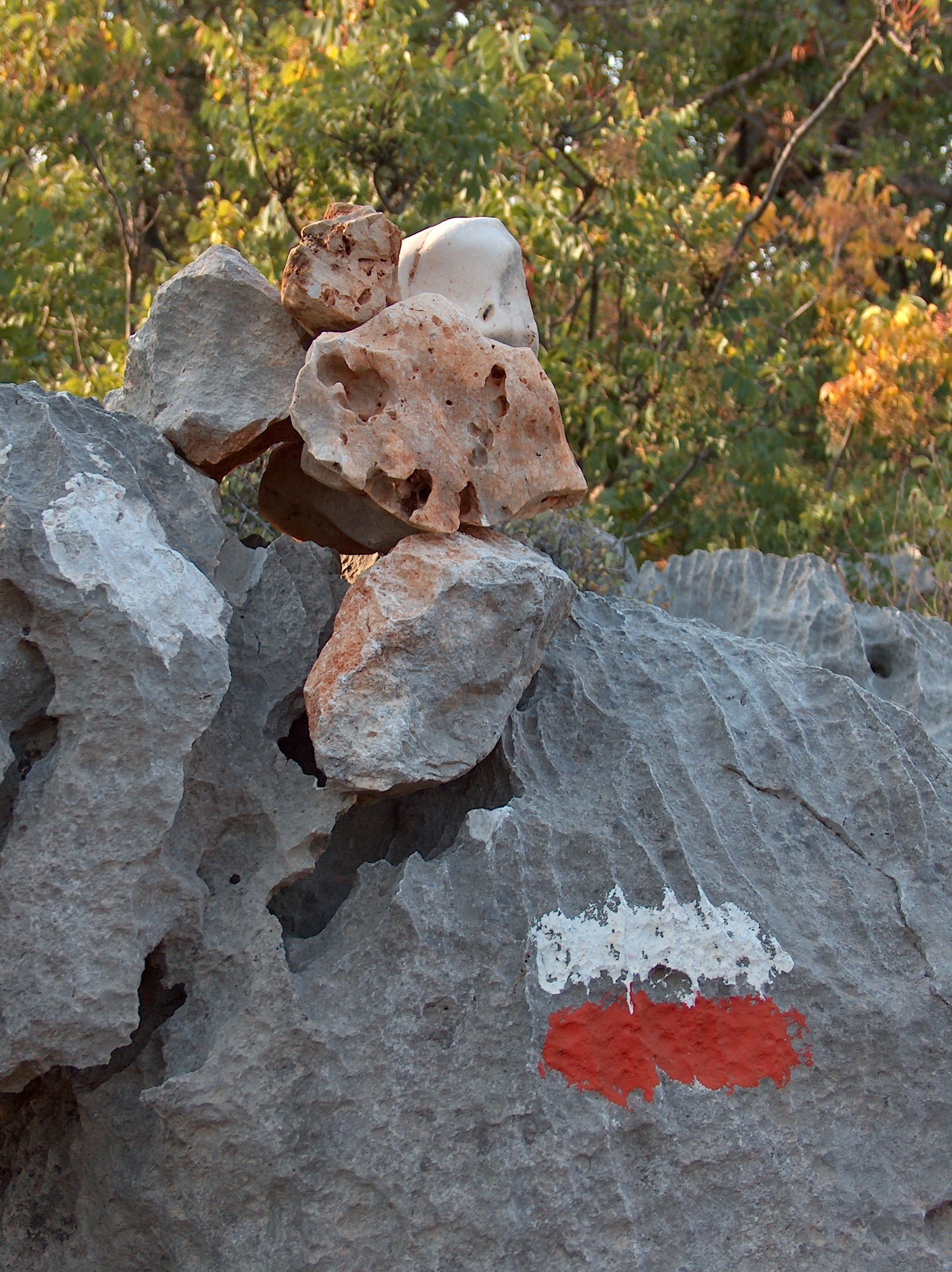 Markierung des Lykischen Weges